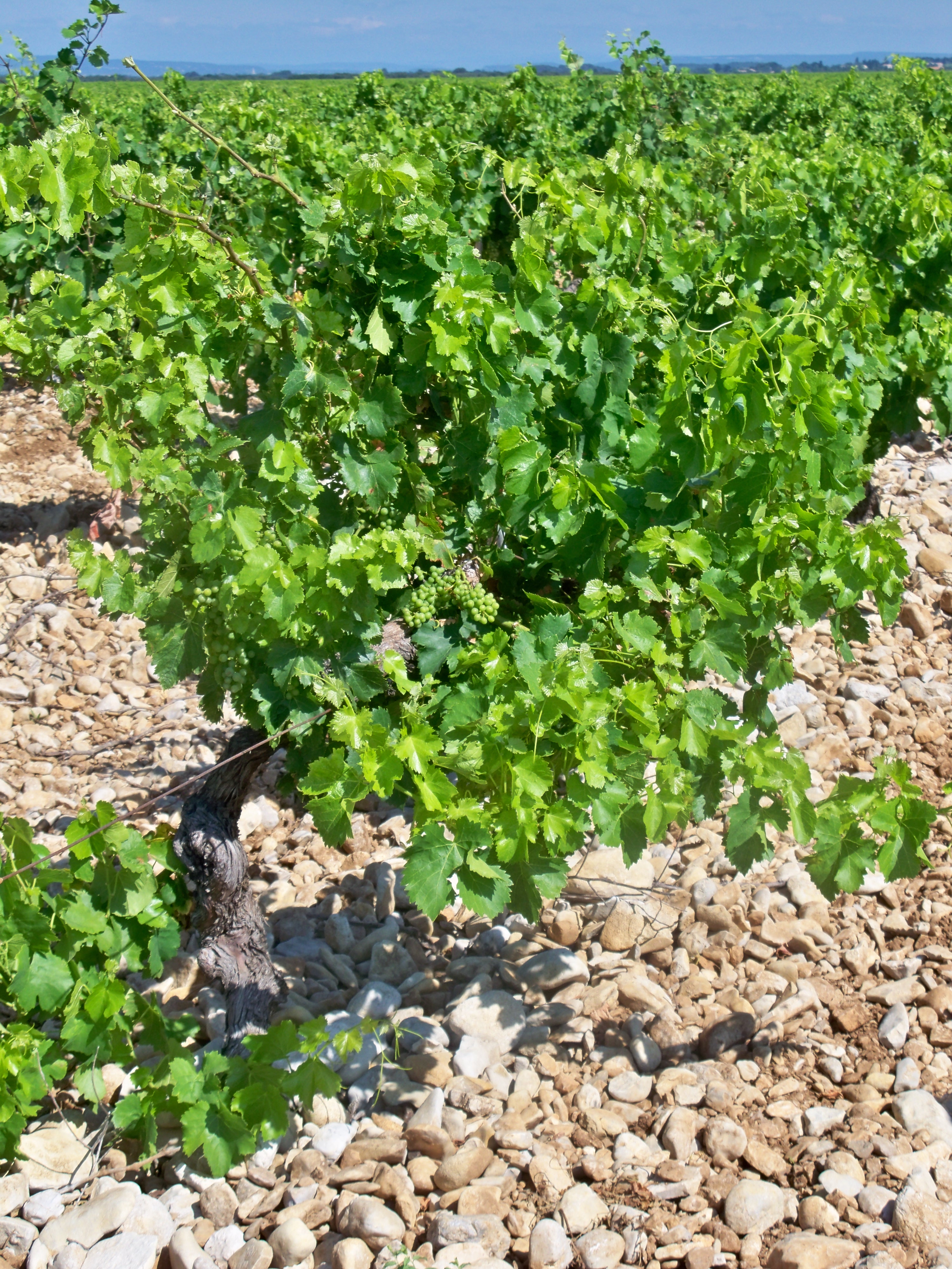 Vignoble Plan de Dieux AOC, Vaucluse